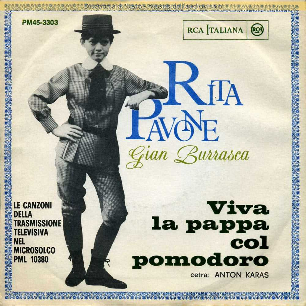 Disco a 45 giri di due facciata, interpretato dalla cantante Rita Pavone, nel lato A il brano “Viva la pappa col pomodoro, nel lato B il brano “Sei la mia mamma”. Autori: Nino Rota, Lina Wertmuller. Orchestra: Luis Enriquez Bacalov. Edizioni Musicali: RCA. Musicisti: Anton Karas cetra.